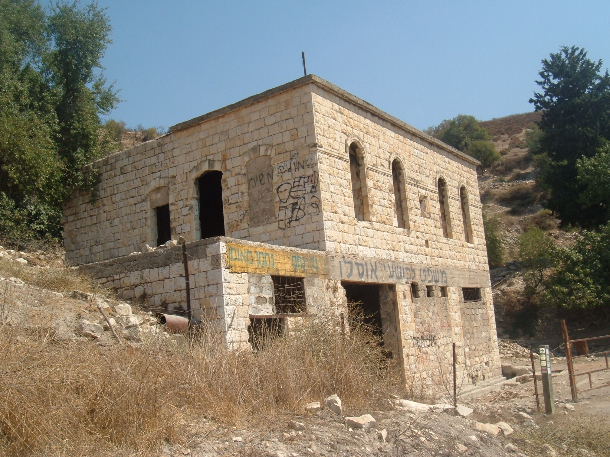 eyn zaytun. שרידי הכפר עין זיתון